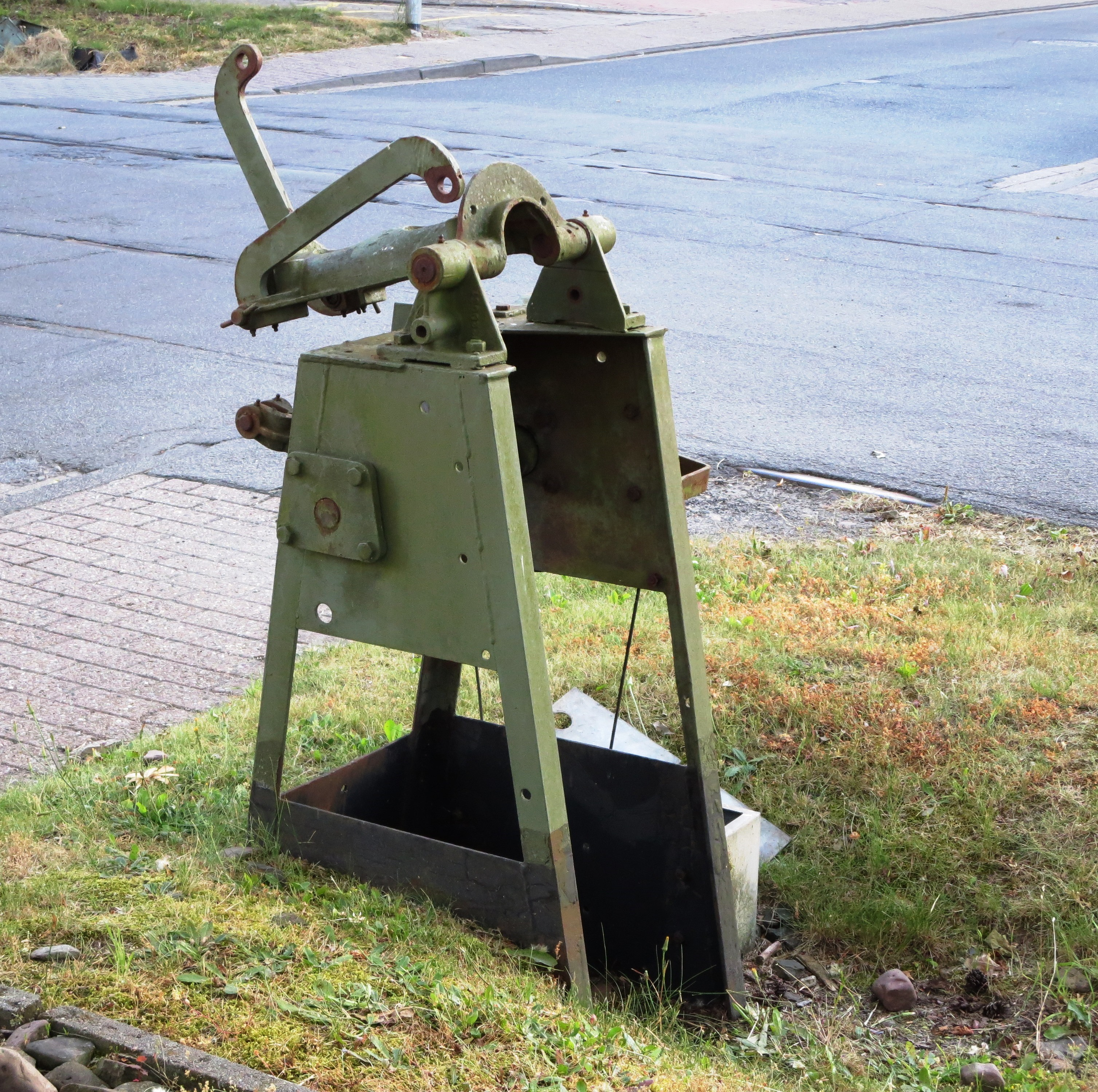 Stütze einer alten Schranke in der August-Hanken-Straße